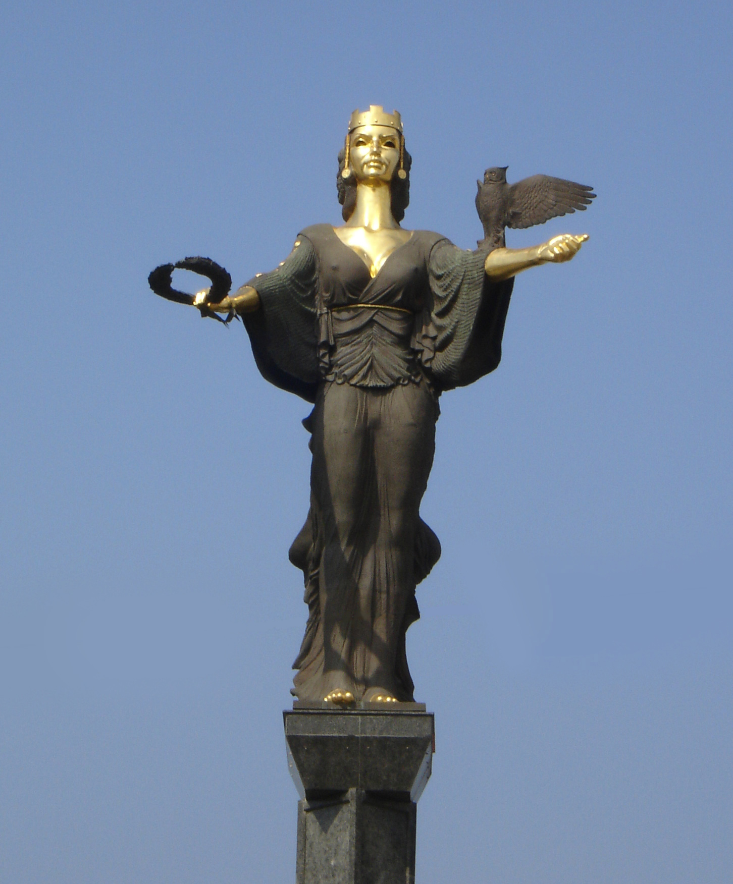 Statue der Sofia in Sofia, Bulgarien